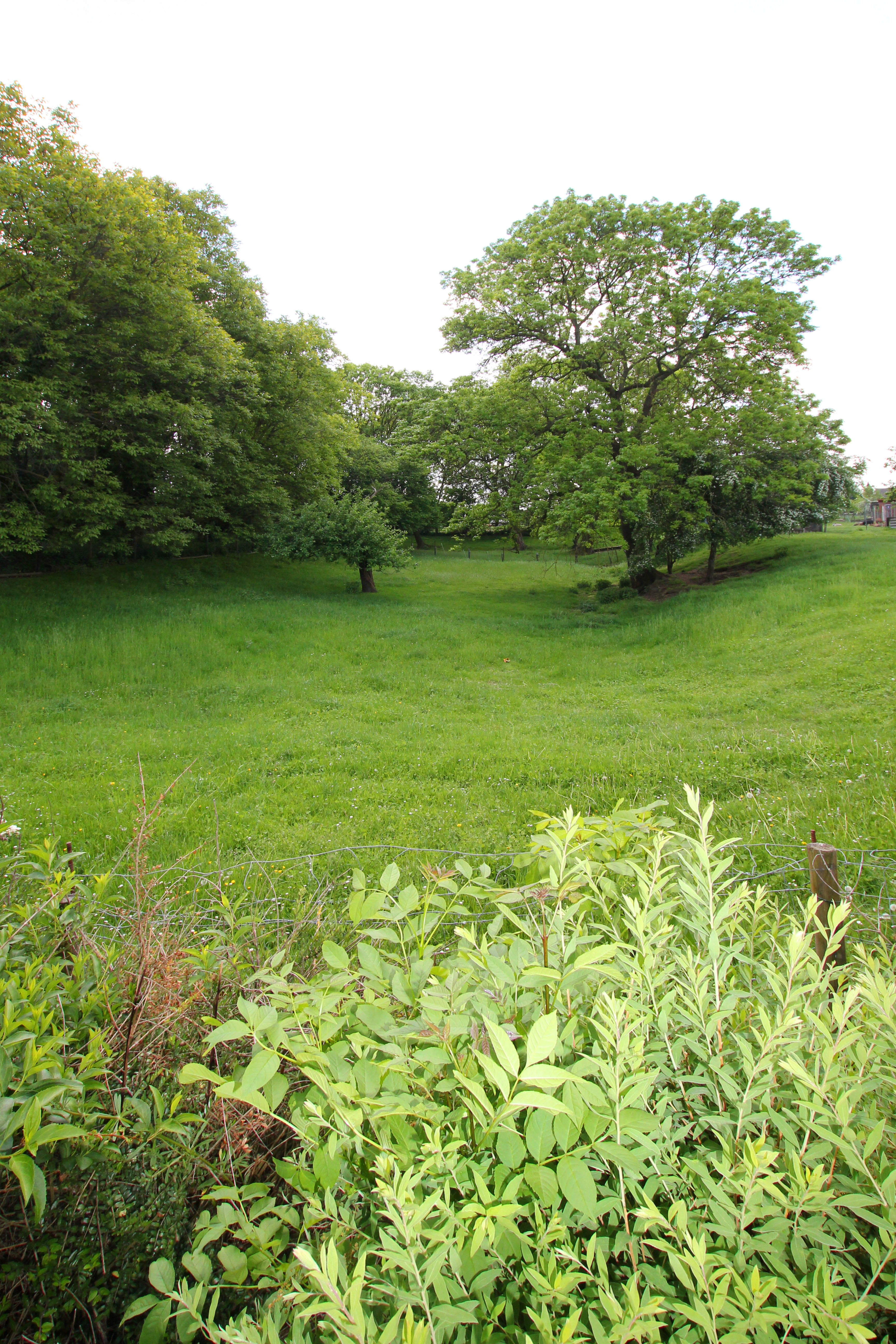 Erftstadt Lechenich, Bodendenkmal. Grabenzug vor der Lechenicher Motte am südwestlichen Ortsrand